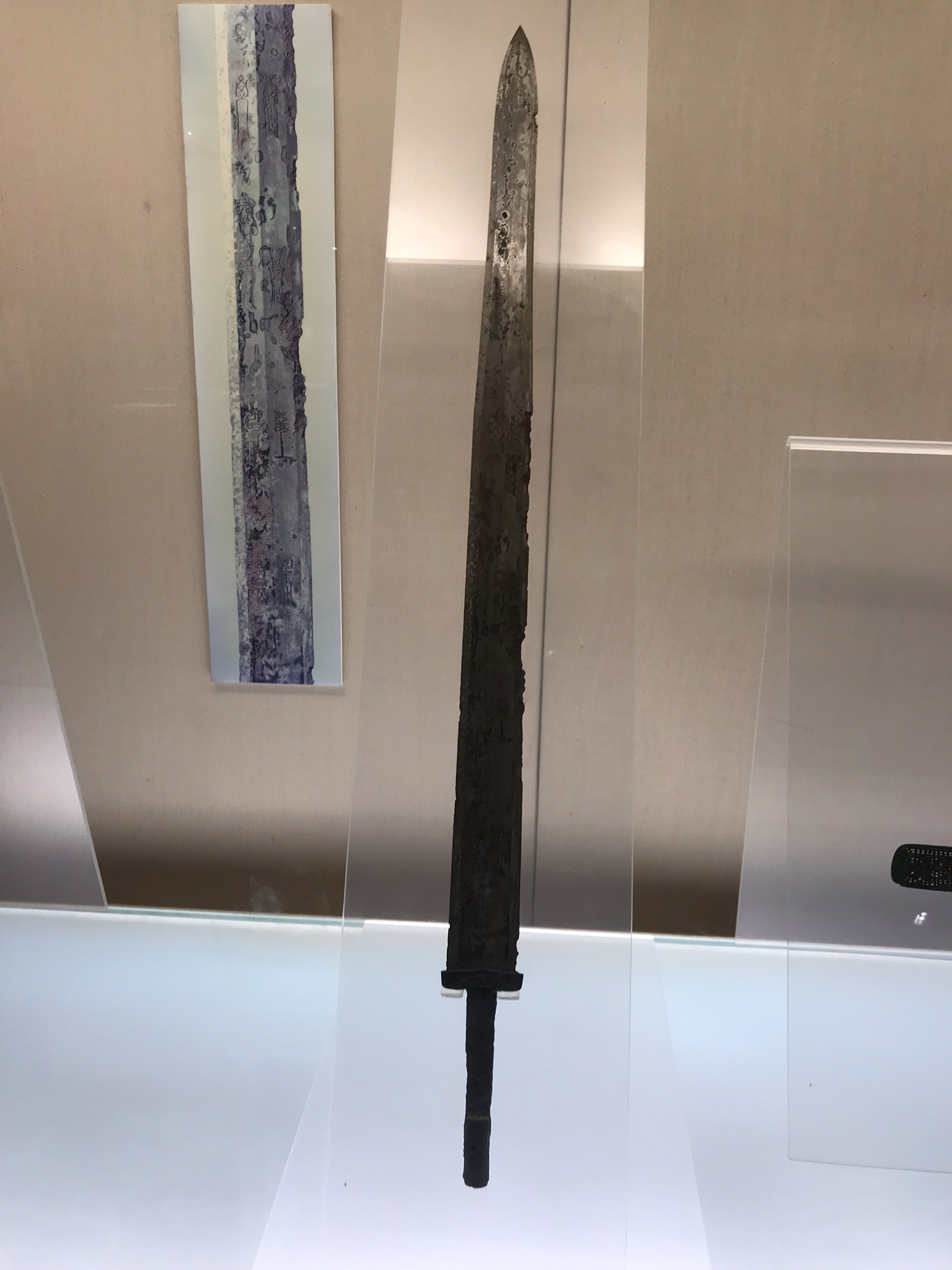 中文（中国大陆）: 吴王光剑（上海博物馆藏）